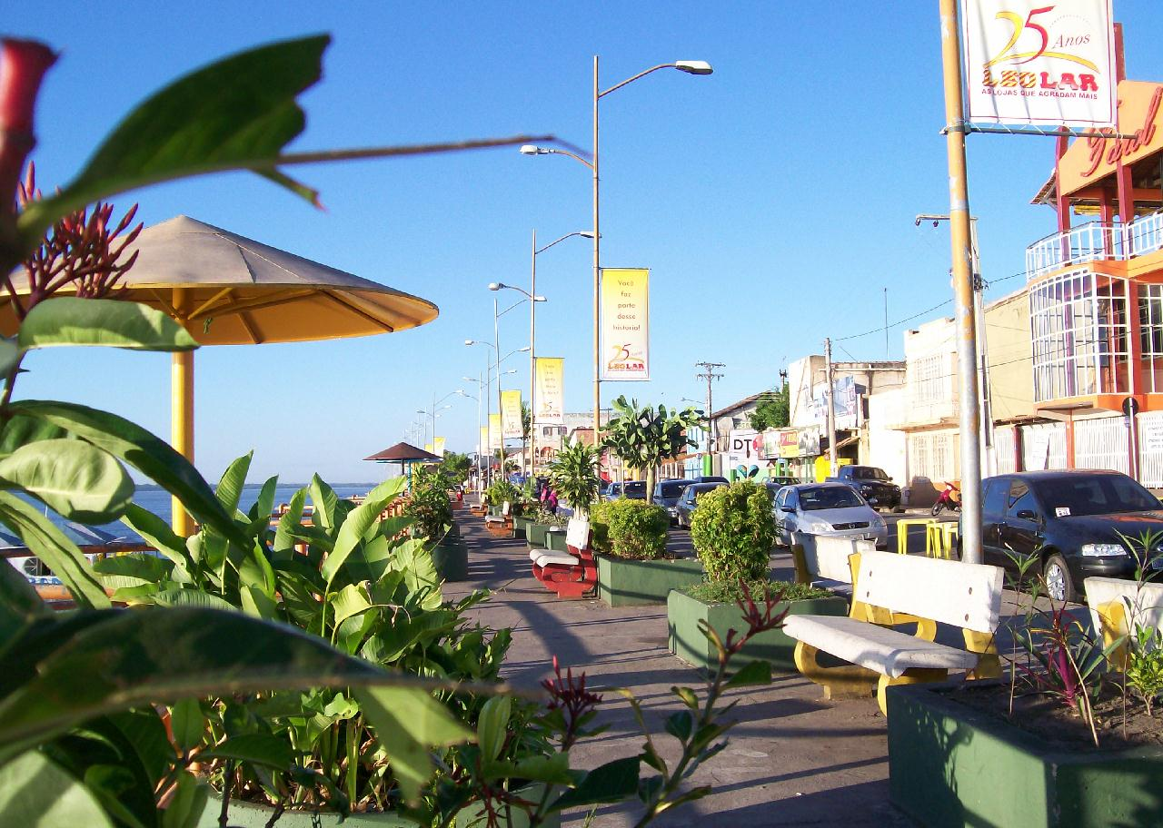 Orla Sebastião Miranda. Marabá Pará, Brasil.